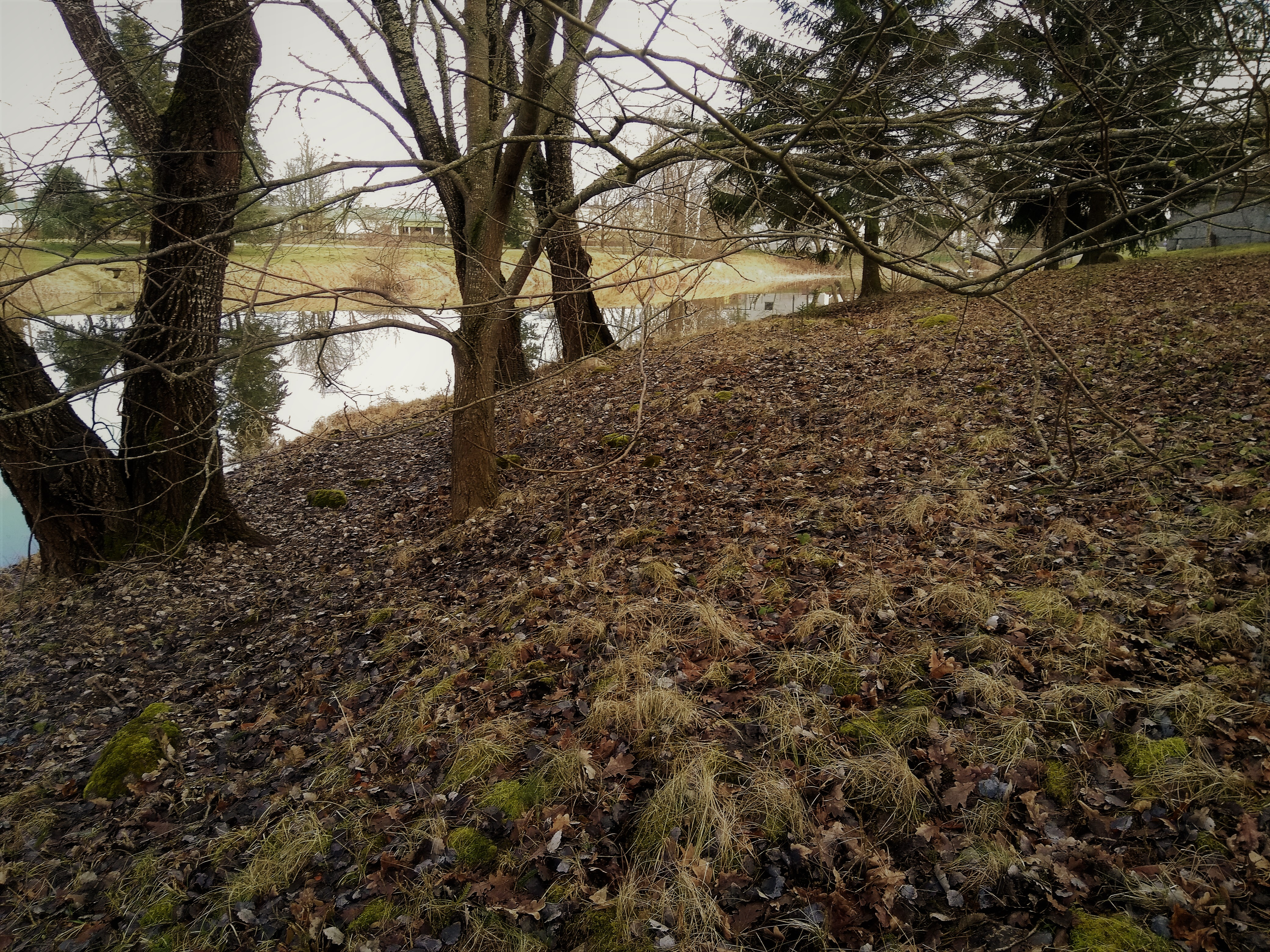 Vaade linnuseala põhjaküljel ida suunas. Maapinnal asetseb palju linnusemüüritisest pärinevaid põllukive.